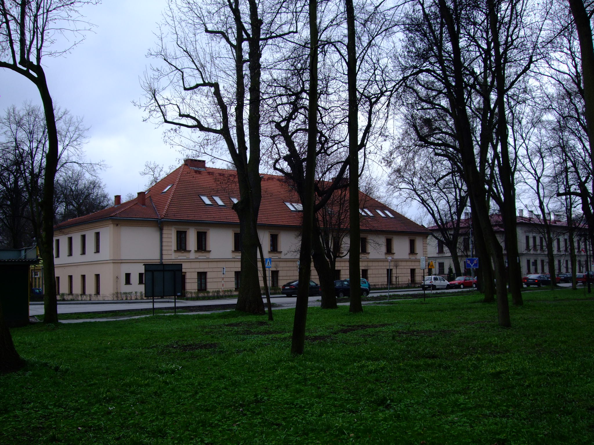 Łazienki "Zofia" w Krzeszowicach, główna siedziba Ośrodka Rehabilitacji Narządów Ruchu.